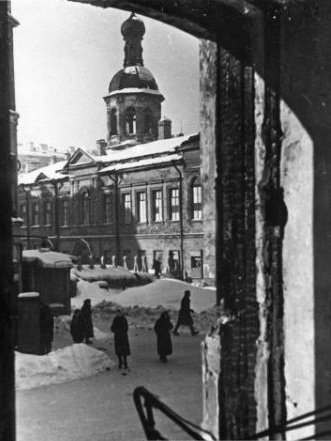 Школа № 321._(блокадная_зима_1941-1942_года)